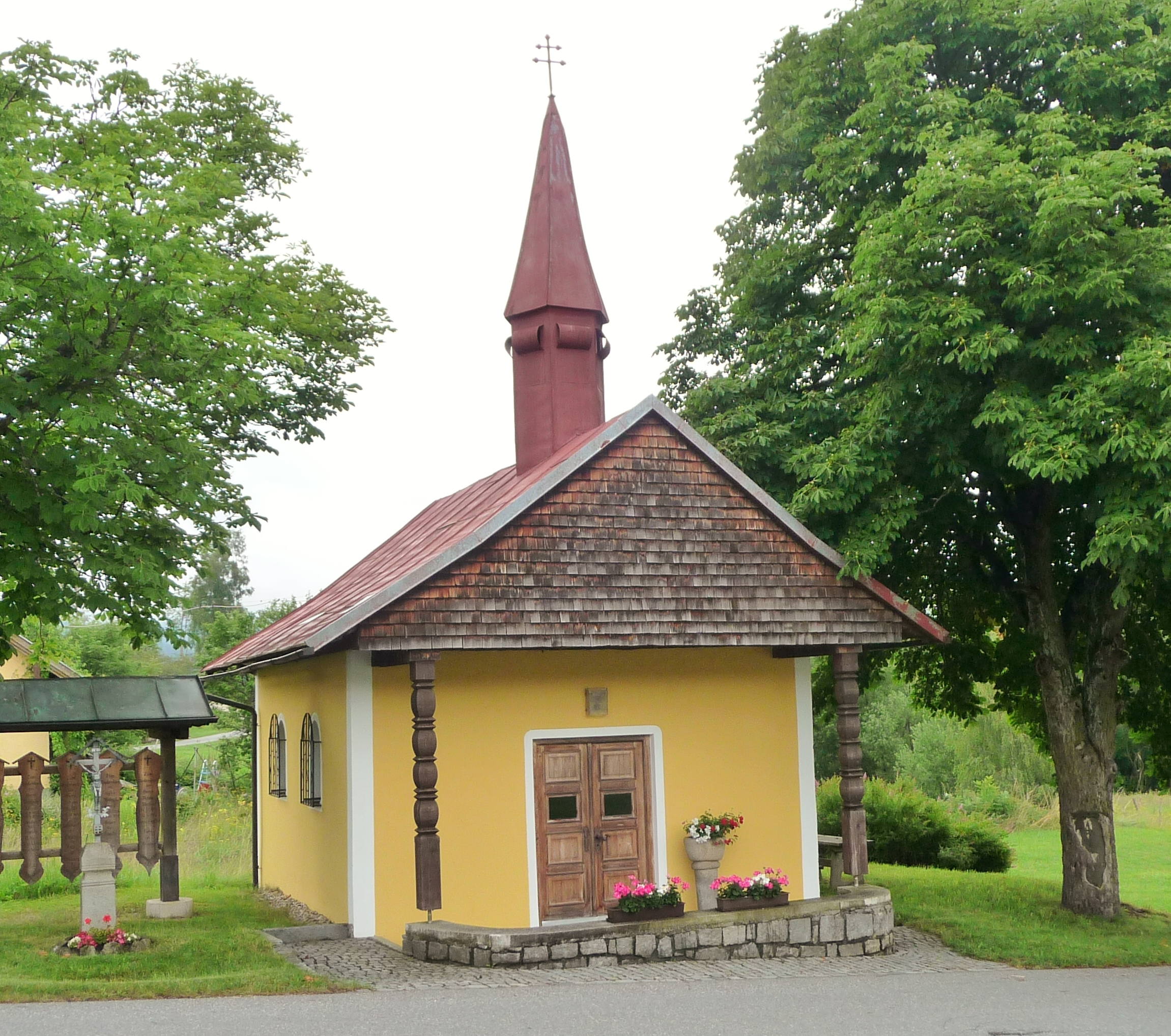 Die Dorfkapelle von Flanitz